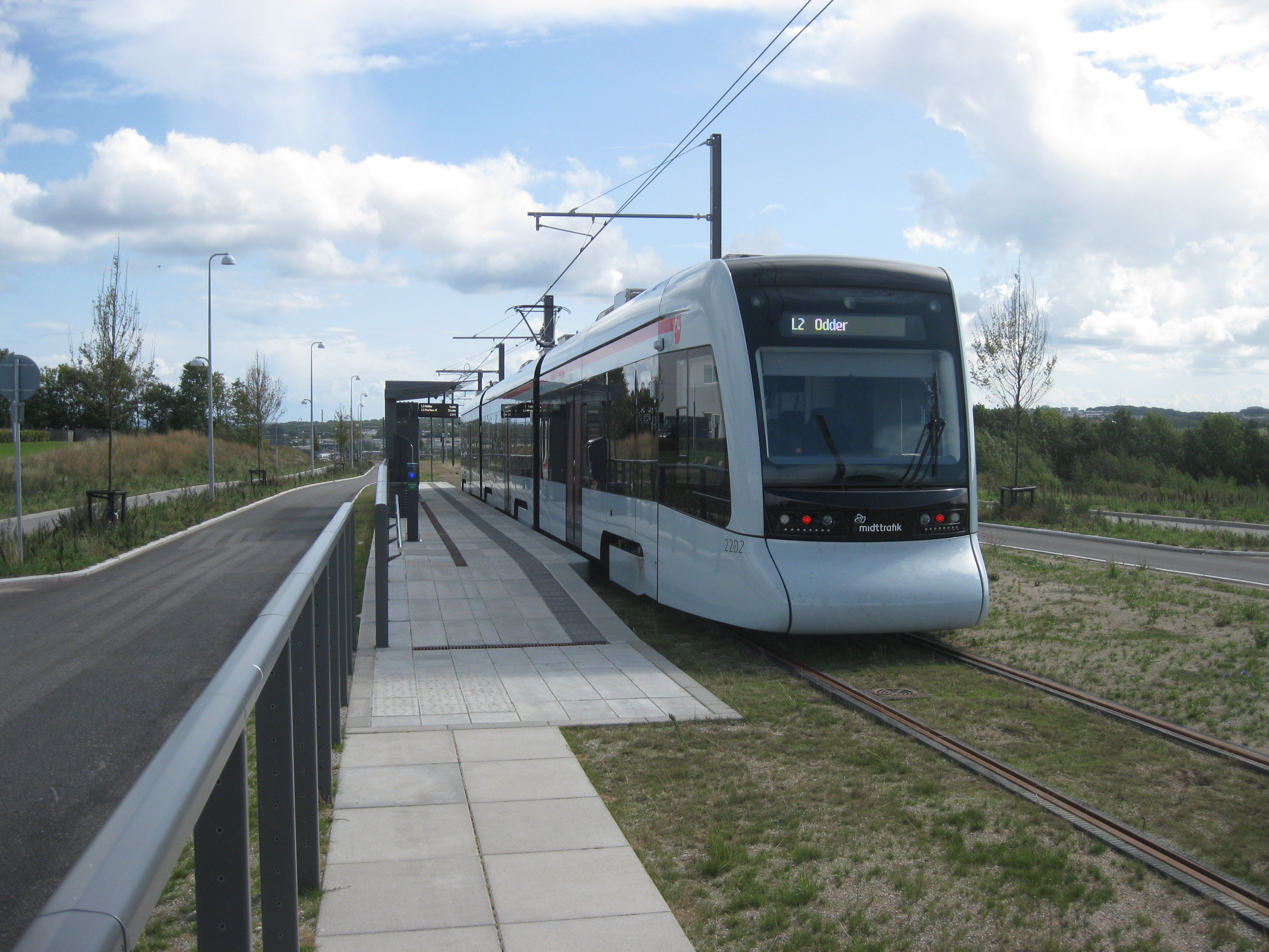 Lisbjergskolen Station, Århus Letbane